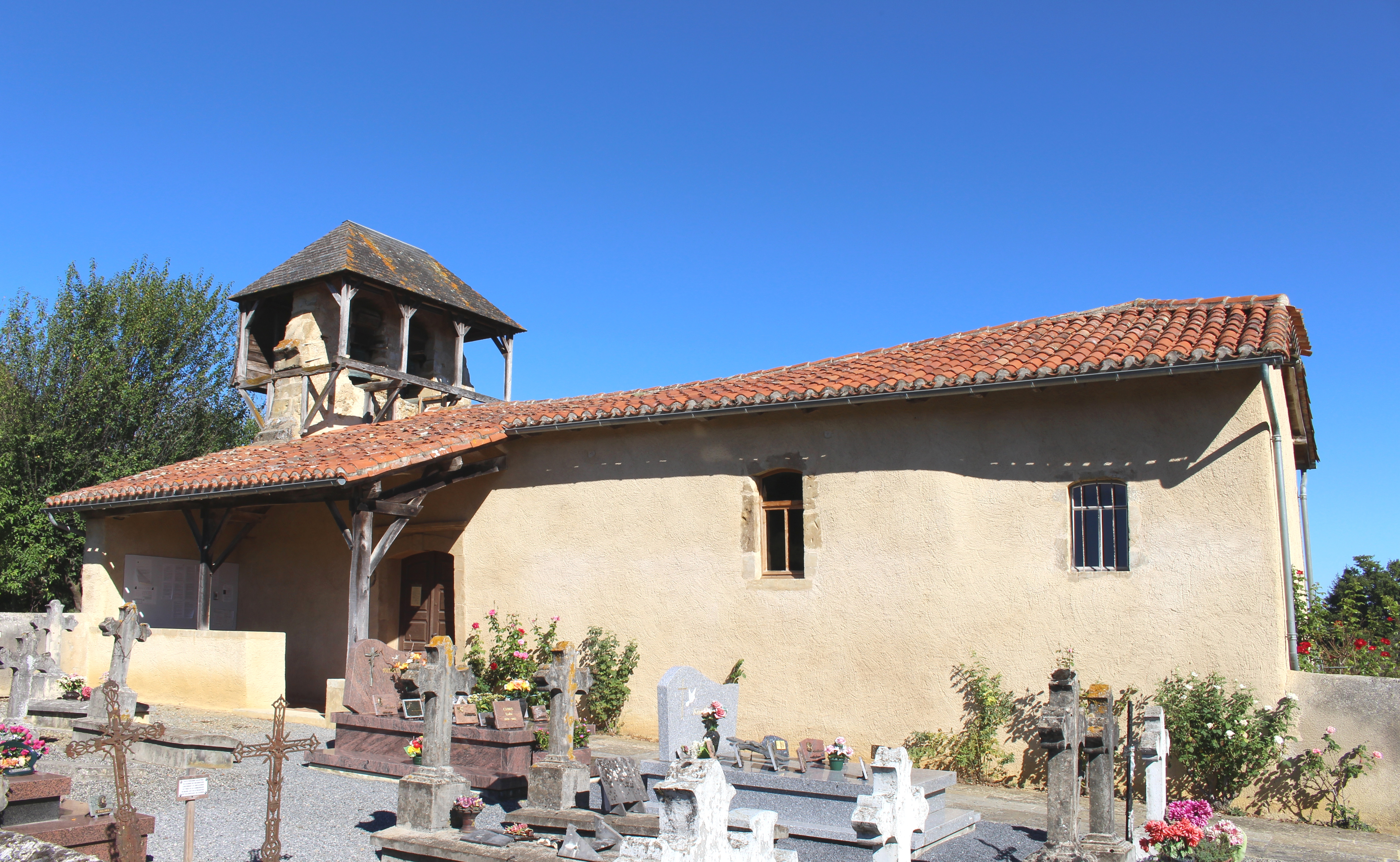 Chapelle Saint-Roch de Betmont (Hautes-Pyrénées)